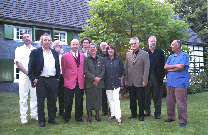 Künstler des Studio Jaeschke (von links): Johannes Grützke, Joachim Schmettau, Dietmar Ullrich, Konrad Klapheck, Justus Mandellaub, Gerda Jaeschke, Peter Nagel, Hede Bühl, Helmut Jaeschke, Heiner Altmeppen, Hermann Waldenburg